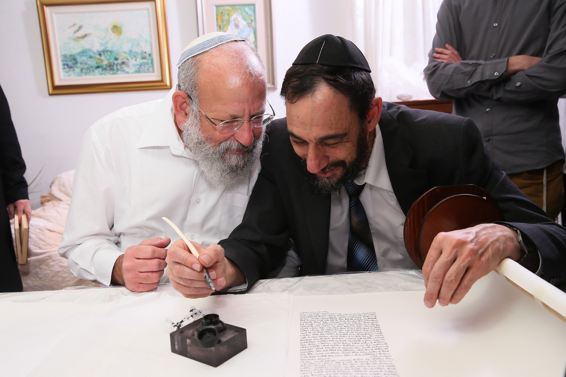 ישיבת מרכז הרב. אלישע וישליצקי בטקס הכנסת ספר תורה בישיבת מרכז הרב, תשע"ה.